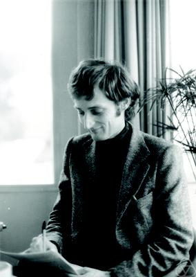 Foto di Harald Rindler